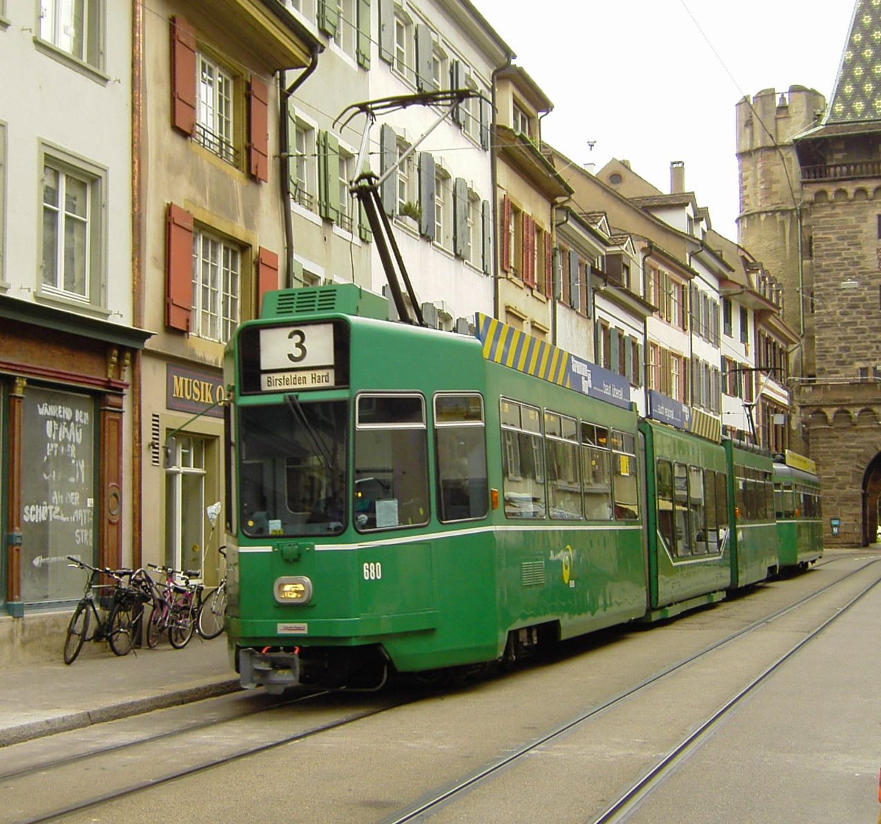 Beschreibung: Straßenbahn der Basler Verkehrs-Betriebe Quelle: selbst aufgenommen Fotograf: CrazyD, 16. Aufgust 2005 Lizenzstatus: GNU FDL Description: tram of the Basler Verkehrs-Betriebe Source: photo was taken by my self Photographer: CrazyD, 16 August 2005 Licence: GNU FDL